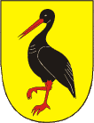 Znak obce